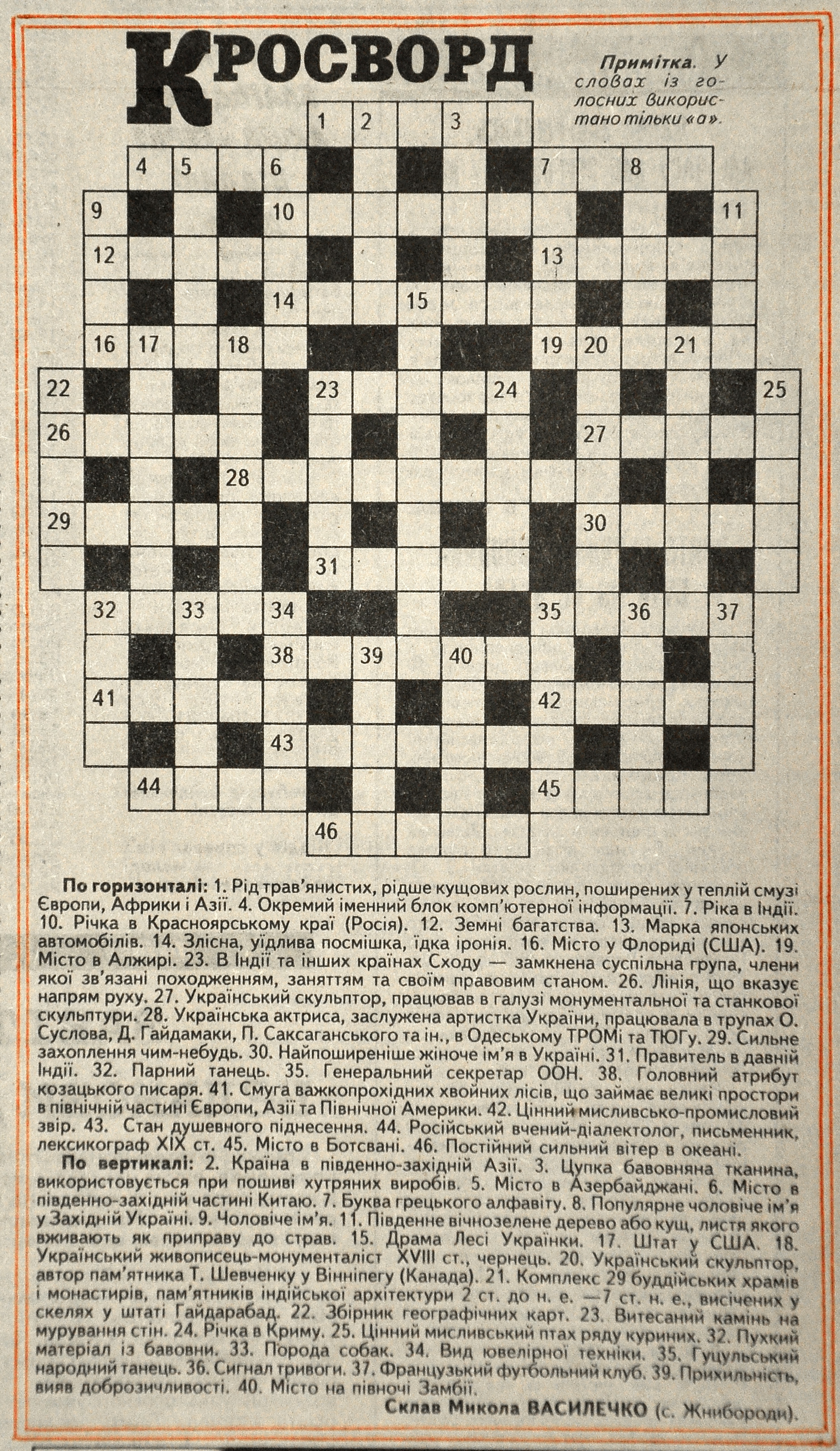 Класичний кросворд Миколи Василечка в газеті «Нова доба», № 33 від 21 серпня 1998 року. Перший опублікований кросворд Миколи Василечка.